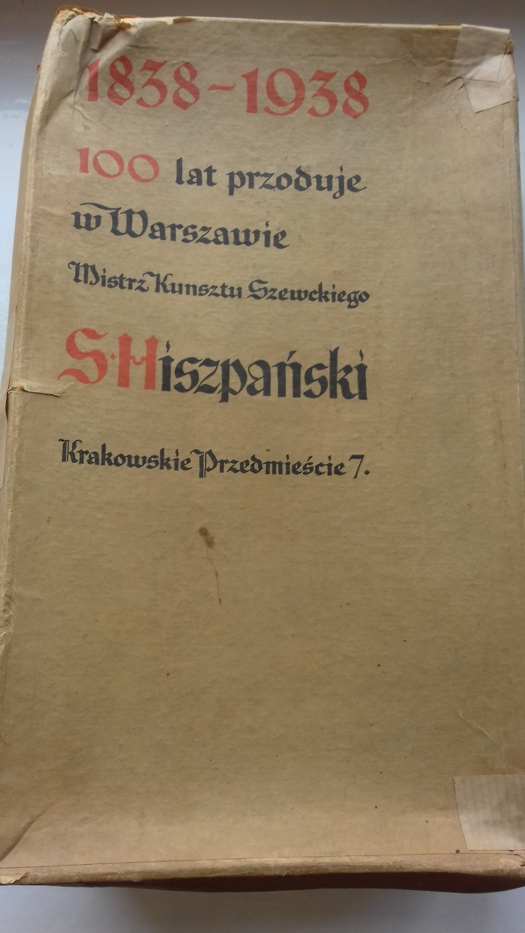 Pudło na trzewiki damskie z Firmy Hiszpanskiego